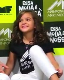 Mel Maia durante entrevista.